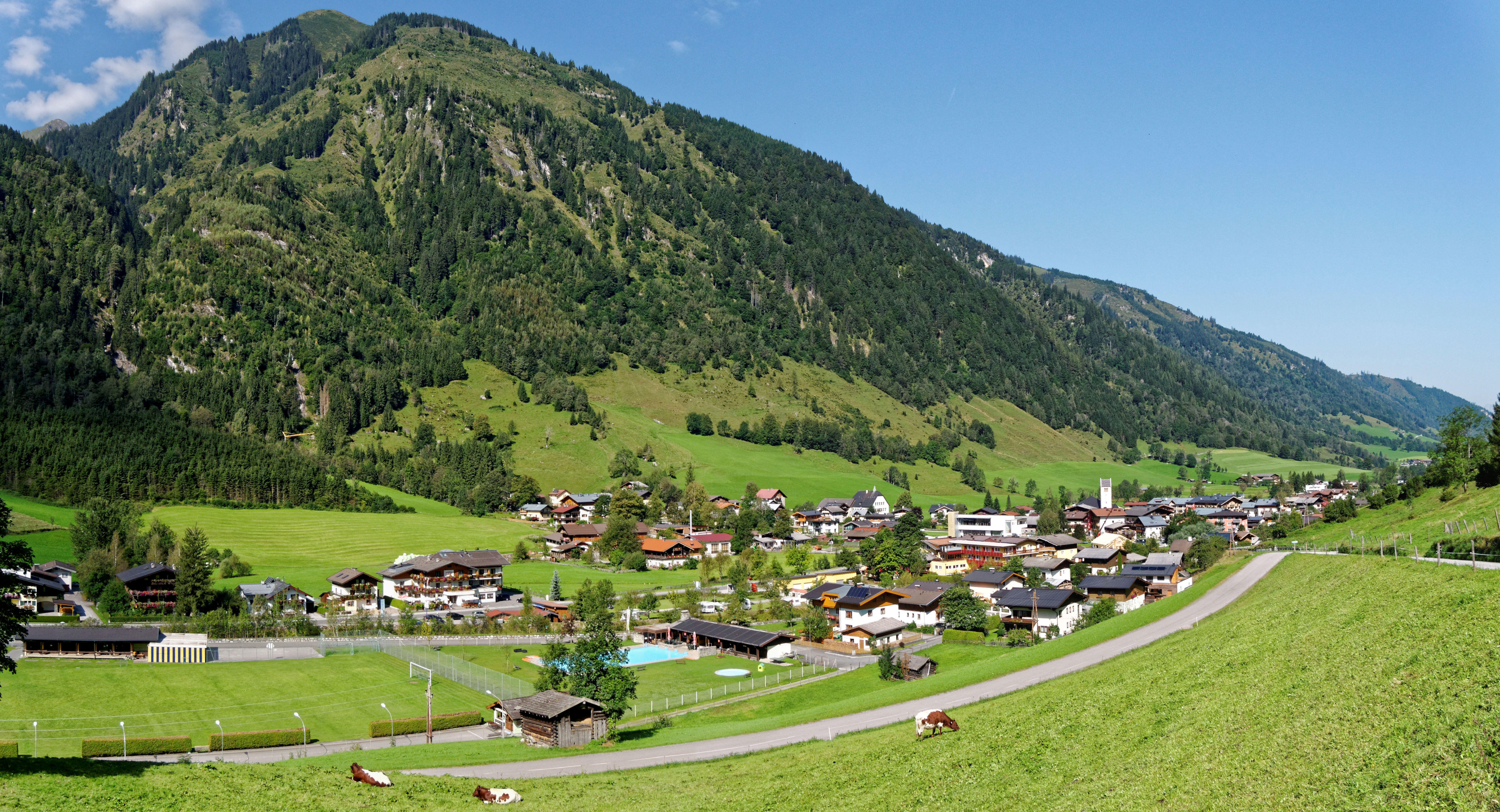 Blick von der Straße nach Bad Fusch auf Fusch an der Großglocknerstraße